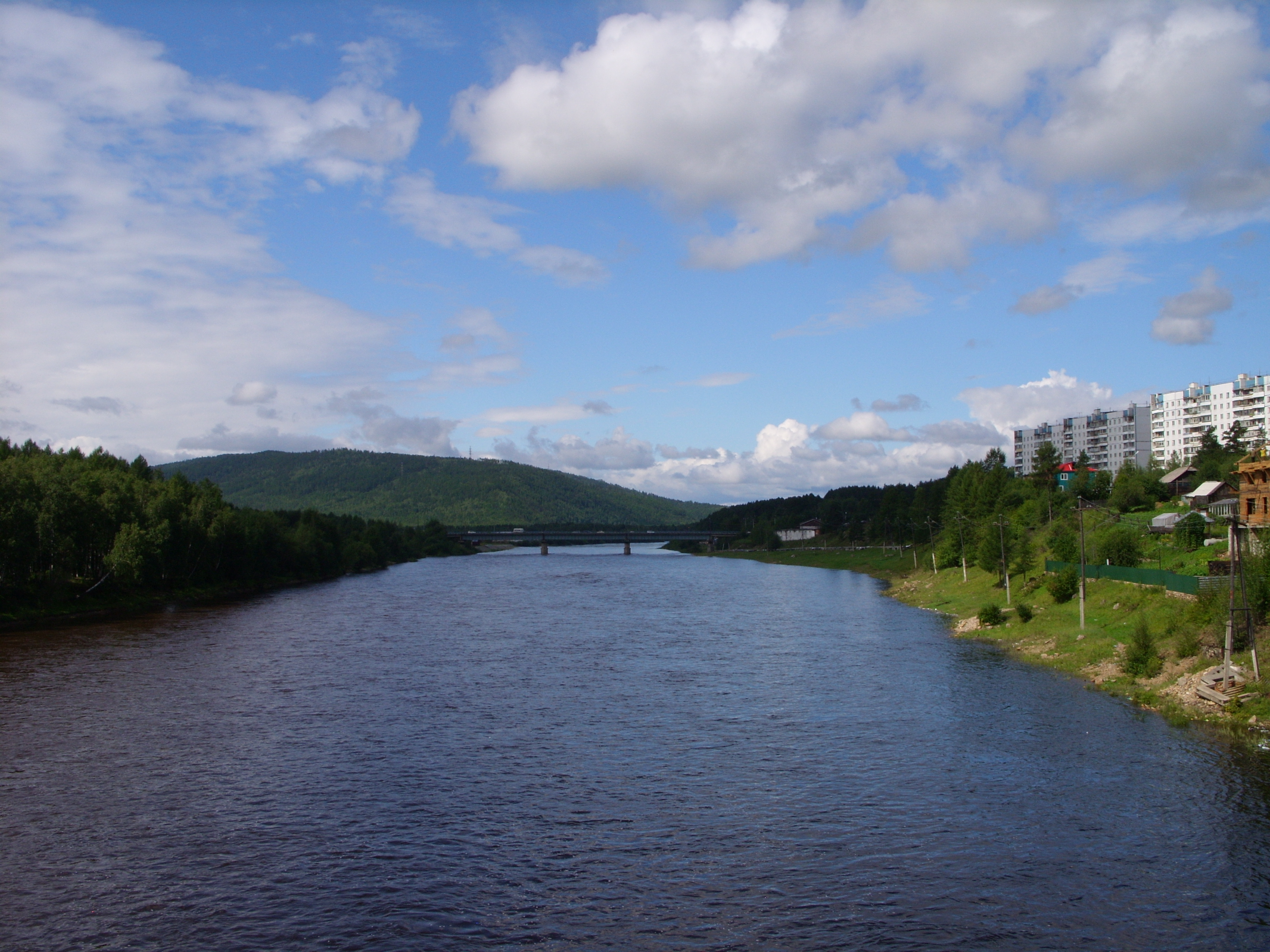 Город Тында летом 2011 года. По дороге в Благовещенск